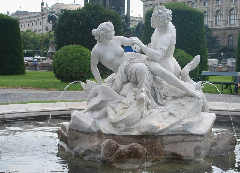 Brunnen C (Naturhistorisches Museum / Museumstraße, Hugo Härdtl): Die insgesamt vier Tritonen- und Najadenbrunnen bilden die Zentren der vier großen Rasenflächen, welche durch die Hauptverbindungswege des Maria-Theresien-Platzes gebildet werden. Errichtet wurden die Brunnen in den Jahren 1887 bis 1890.